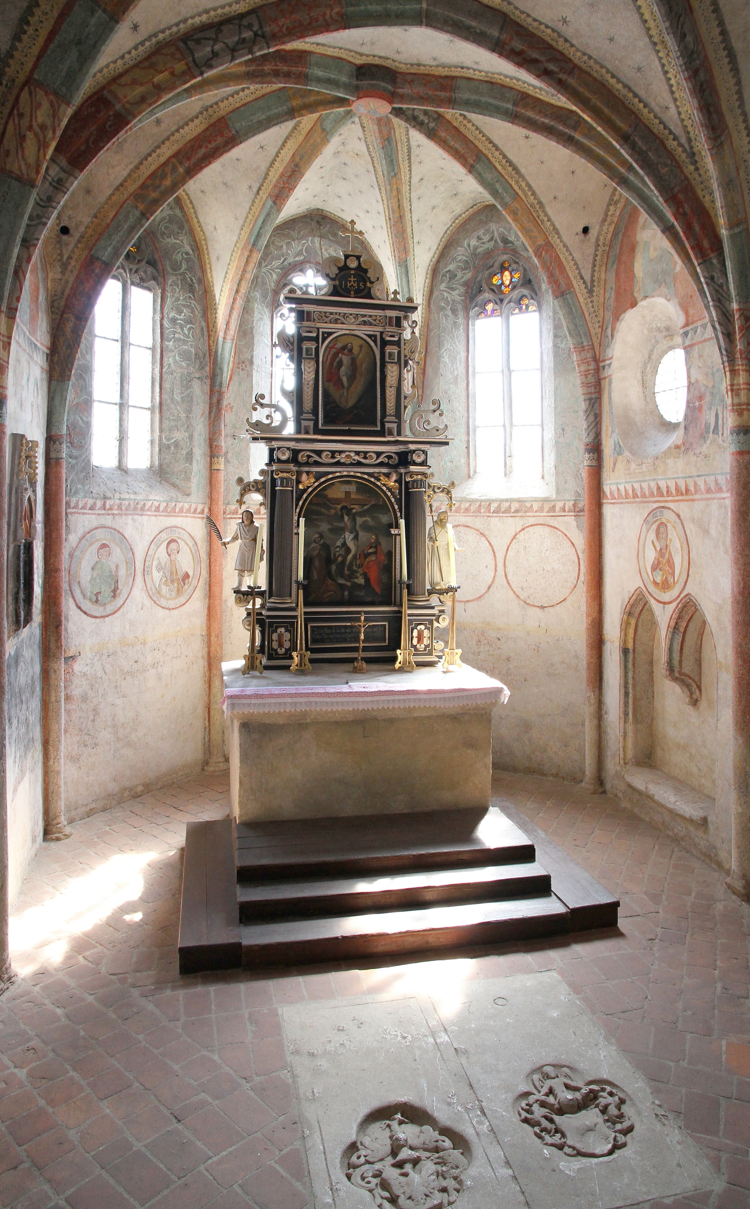 Altar im Pankratiuschor der Fischerkirche in der burgenländischen Stadt Rust.